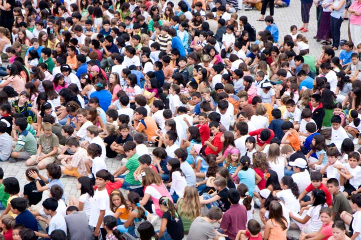 (Original) Diversidad étnica de un colegio de Lima, distrito de Miraflores, Perú